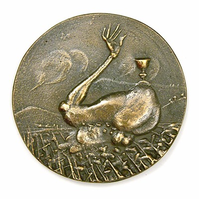 id. Szlávics László: Orgia, bronz, öntött, érem, 1985. Laszlo Szlavics Sr.: Orgy, bronze, cast, medal, 1985.